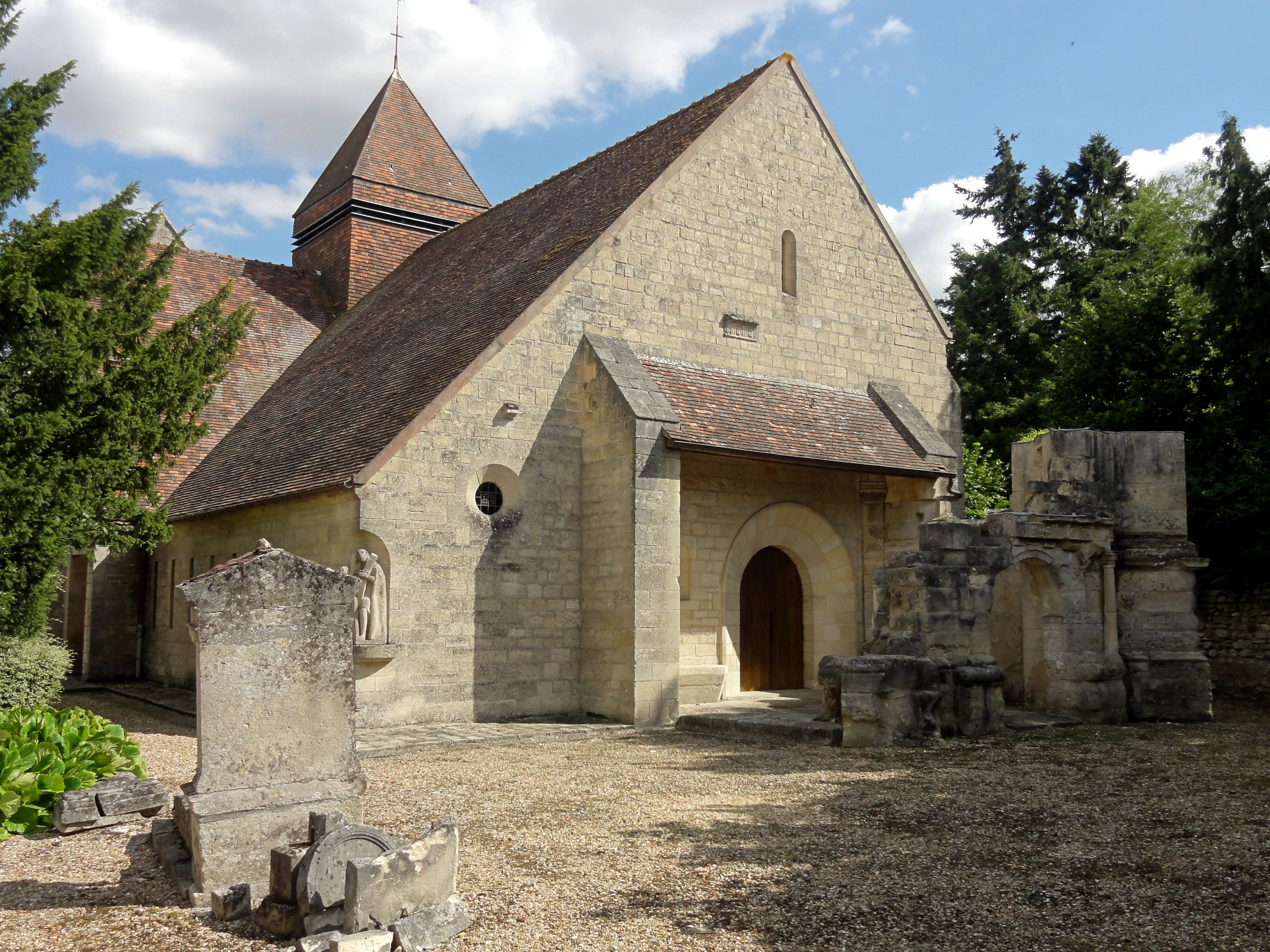 Vue depuis le nord-ouest.